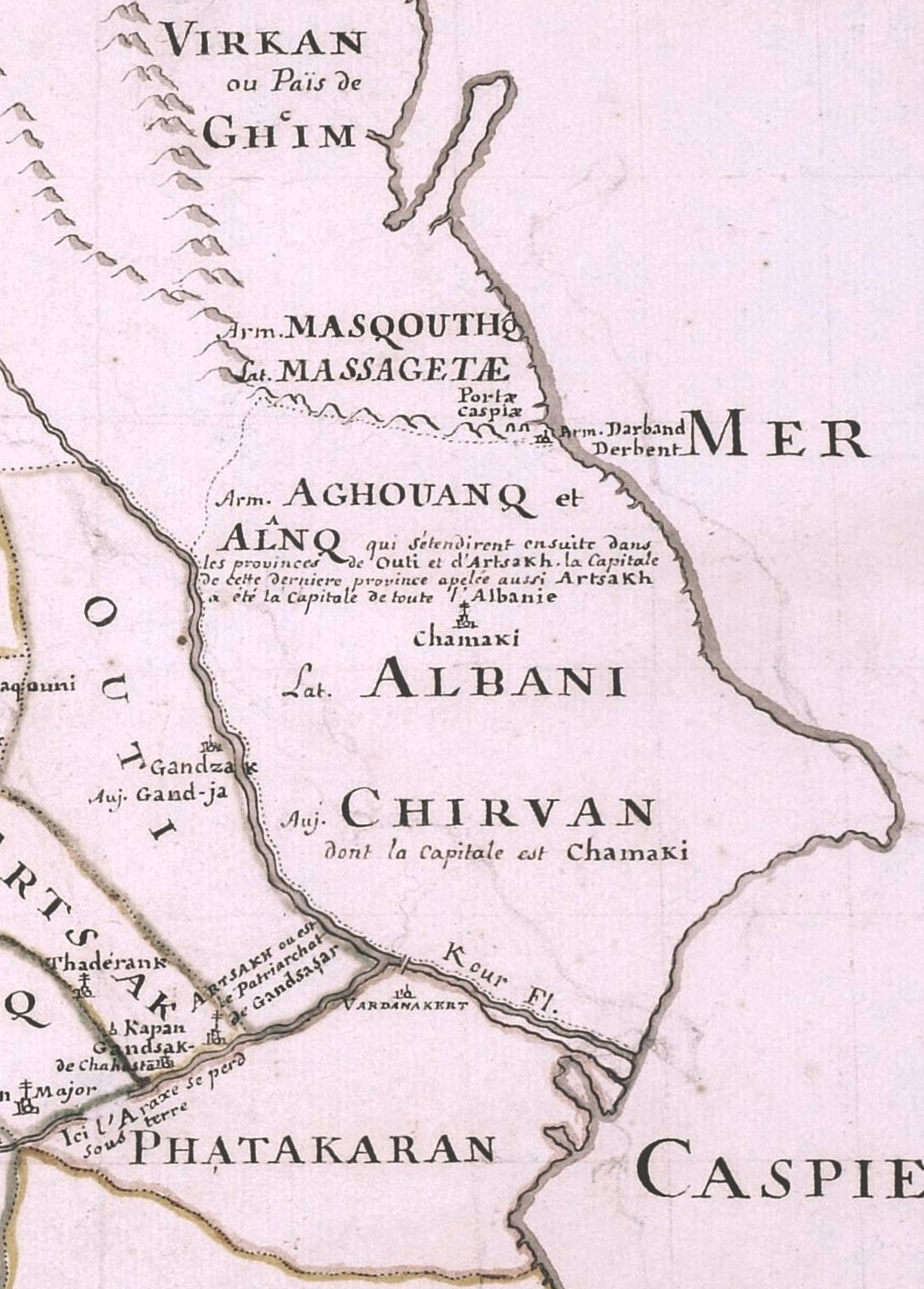 L'Arménie majeure dressée sur les auteurs arméniens et divisée en 16 grandes provinces.